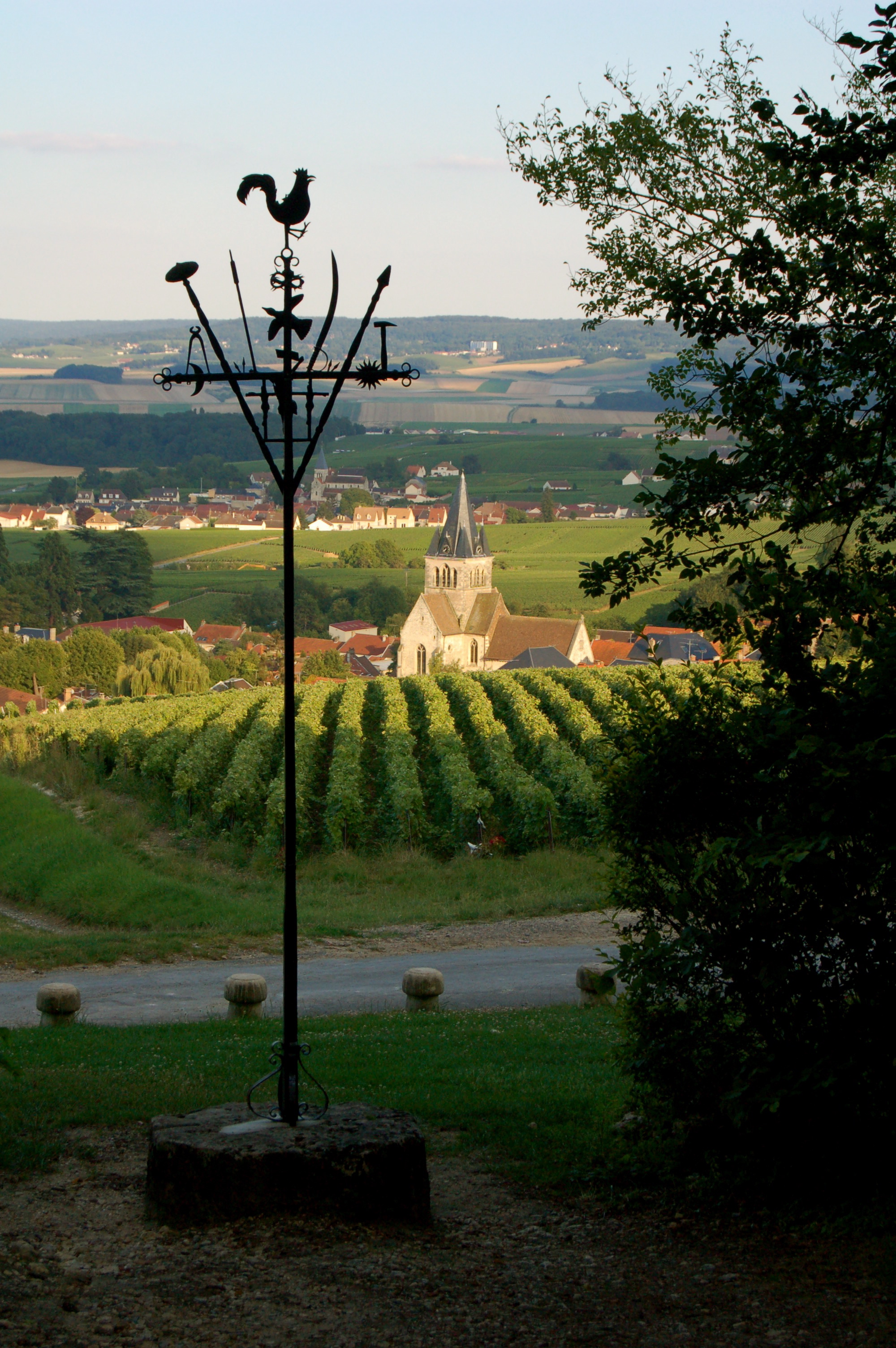 Villedommange et l'Église Saint-Jean-Baptiste depuis la Chapelle Saint-Lié